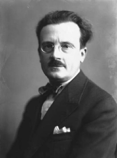 Virgilio Brocchi